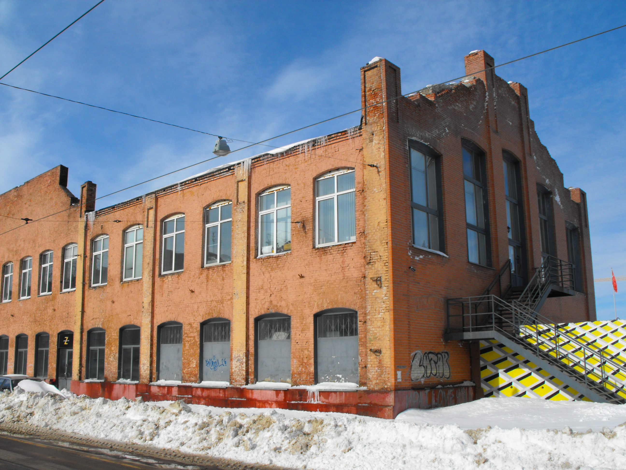 Минск, улица Октябрьская. Март 2013 года.